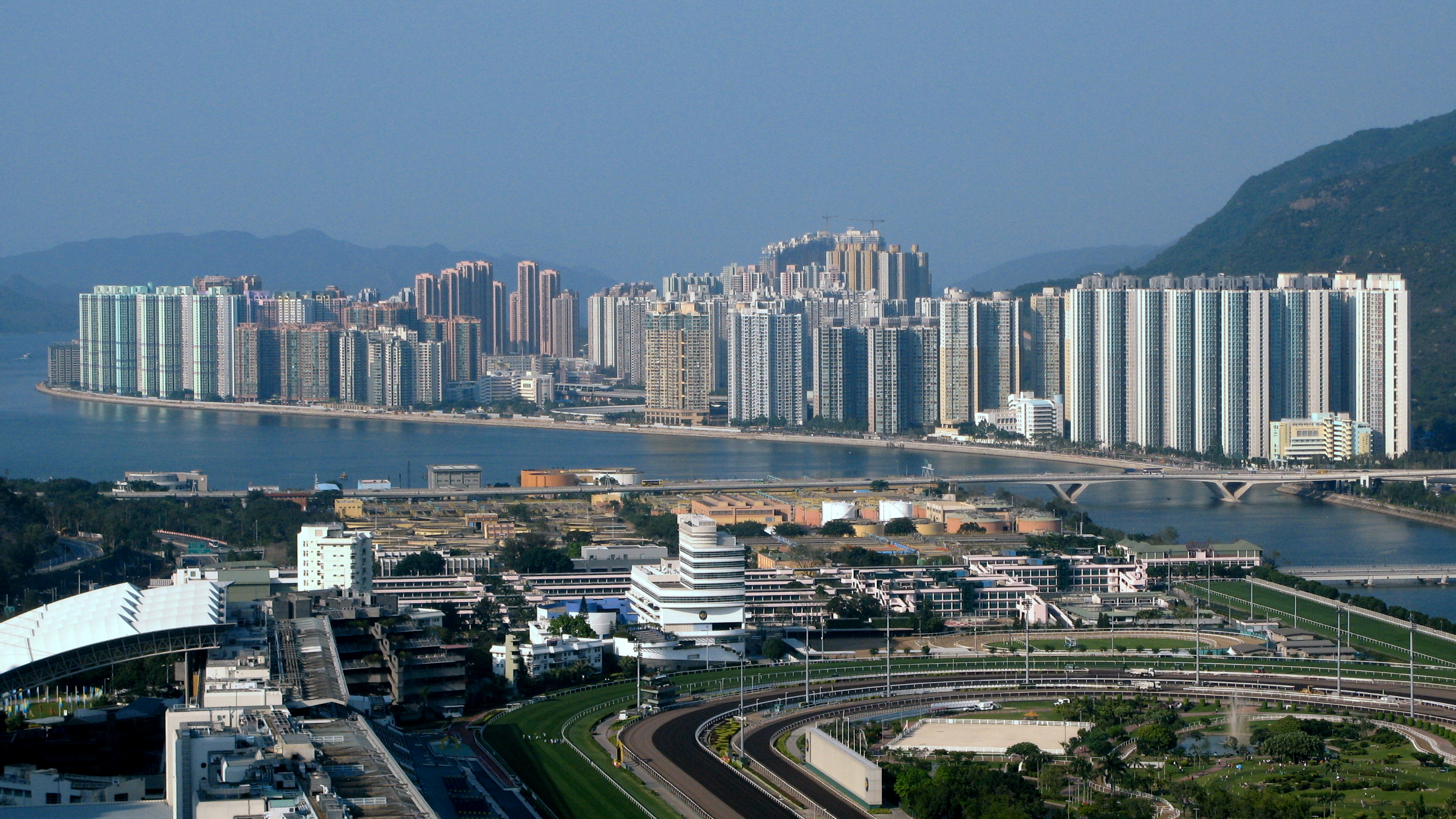 Ma On Shan Skyline